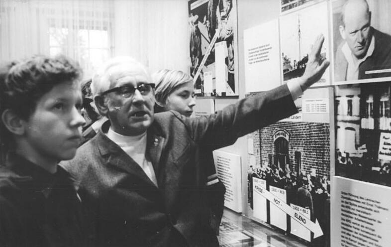 ADN-ZB Franke 8.1.1974 Berlin: Gedenk- und Bildungsstätte ist jetzt die ehemalige Reichsparteischule "Rosa Luxemburg" der KPD in Schöneiche-Fichtenau bei Berlin. Zu den Teilnehmern des letzten Lehrgangs von 1932 bis 1933 gehörte Genosse Paul Görbing. Von dieser schweren Zeit berichtet er den Jugendweiheteilnehmern der Schöneicher Schule. In dieser höchsten Bildungsstätte der KPD, in der einst Ernst Thälmann lehrte, wurden Kader der Partei erzogen, die sich im Kampf gegen Faschismus und Krieg, für Frieden, Demokratie und Sozialismus bewährten.